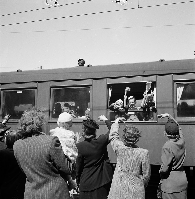 Föräldrar som vinkar av barn påväg med extratåg på Stockholms Östra påväg till Norrtälje för vidare transport mot Barnens Ö.